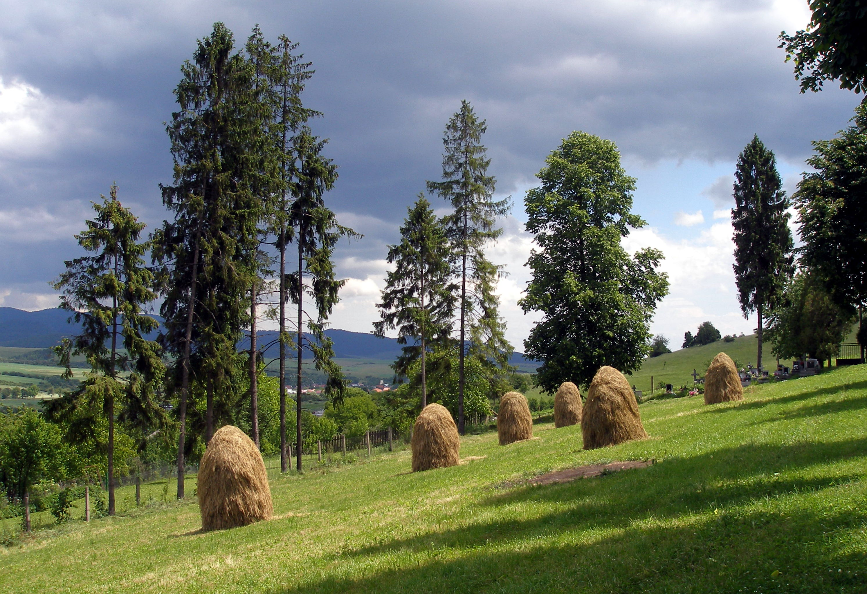 Obec Rožkovany okres Sabinov